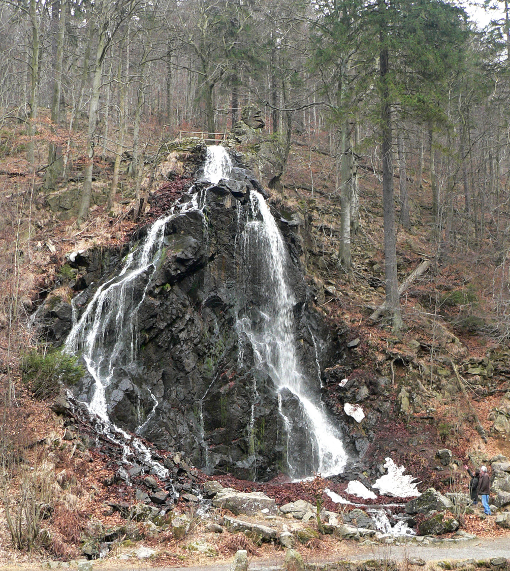 Radaufall